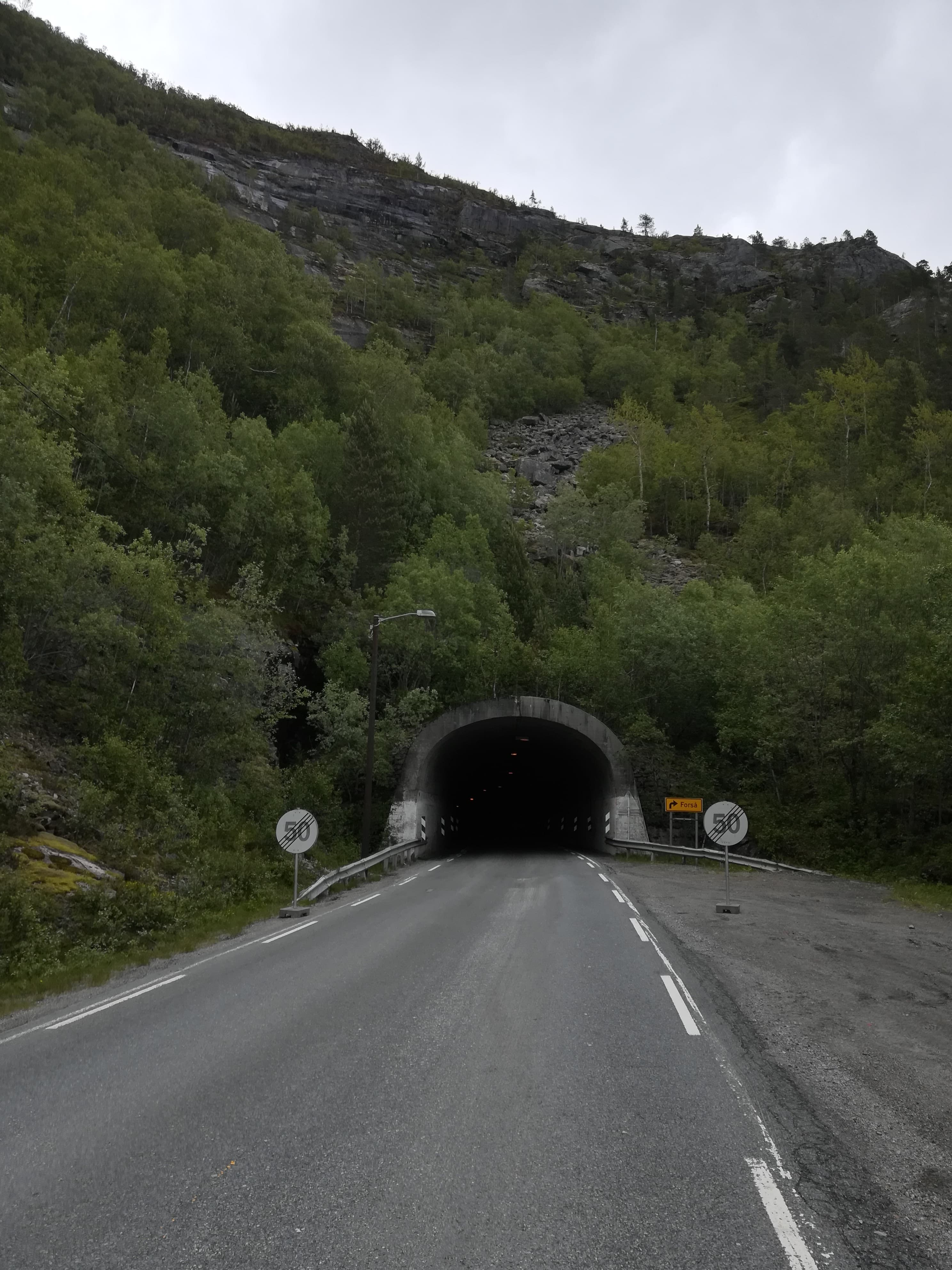 Forsåtunnelen. E6 Ballangen.